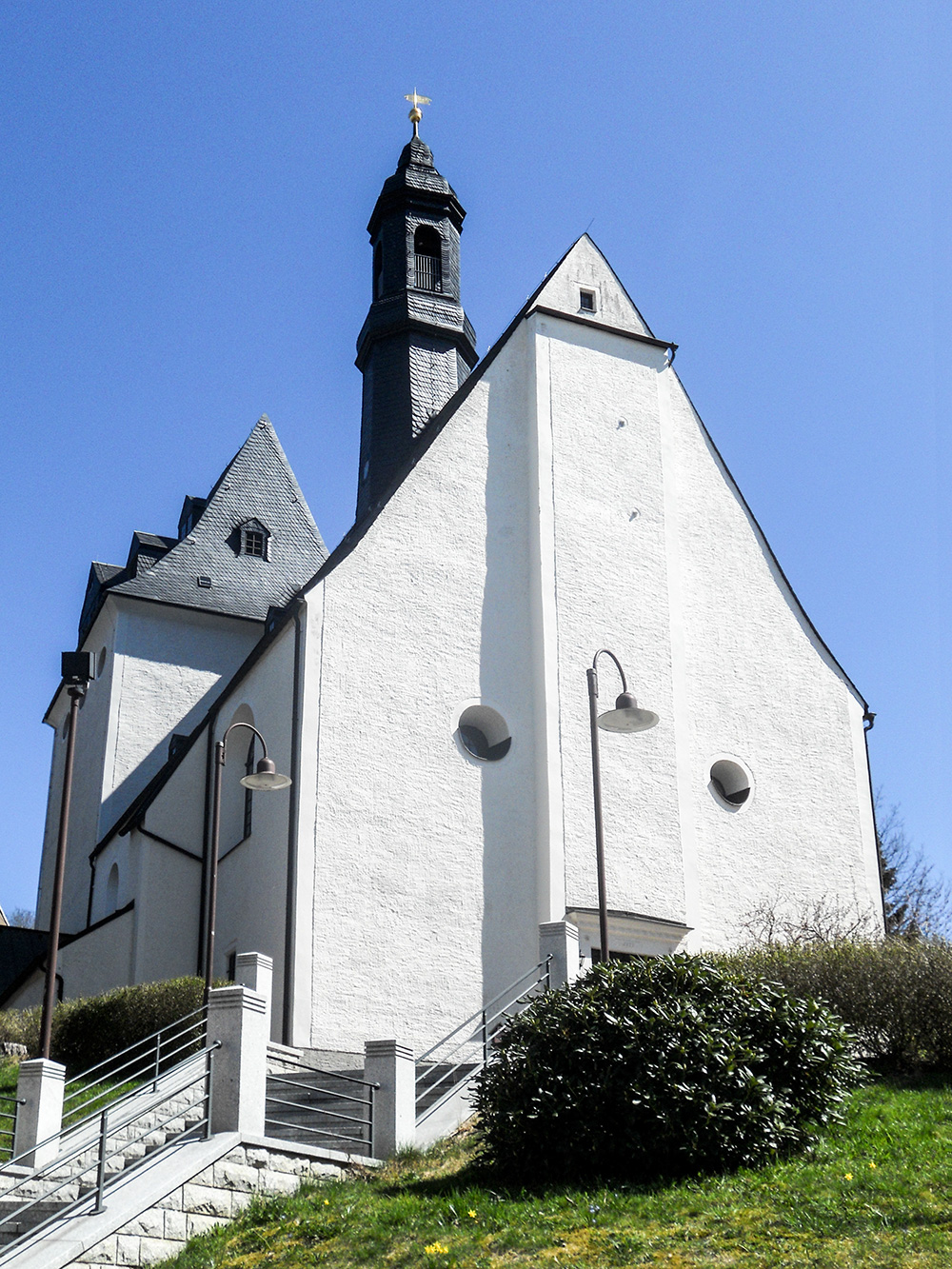 Ehrenfriedersdorfer St. Niklas Kirche